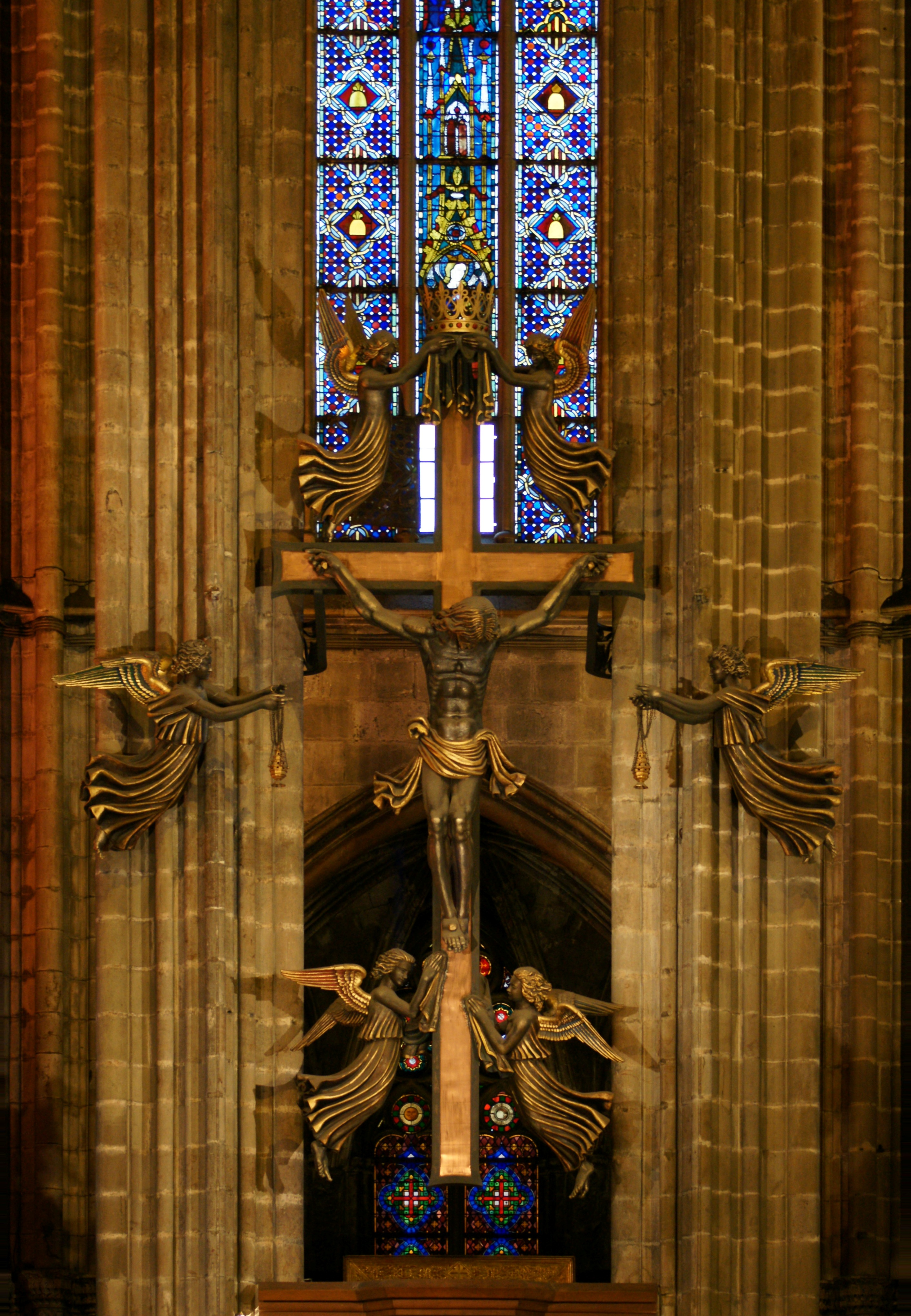 La Catedral ist eine gotische Kathedrale in Barcelona und Metropolitankirche des Erzbistums Barcelona. Sie befindet sich am Platz Pla de la Seu im Stadtviertel Barri Gòtic und ist der Heiligen Eulalia geweiht.